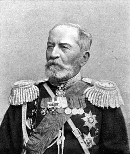 Гончаров, Степан Осипович (1831—1912) — комендант Свеаборгской крепости, исправляющий должность генерал-губернатора Великого княжества Финляндского, член Военного совета Российской империи. Чин/звание: «Генерал от инфантерии» Знаки различия на картине: эполеты и звёзды «Генерал-лейтенант».